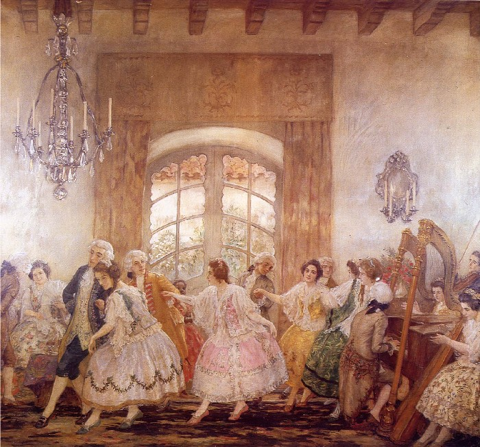 Baile del Santiago (de Chile) antiguo. Oleo de Pedro Subercaseaux